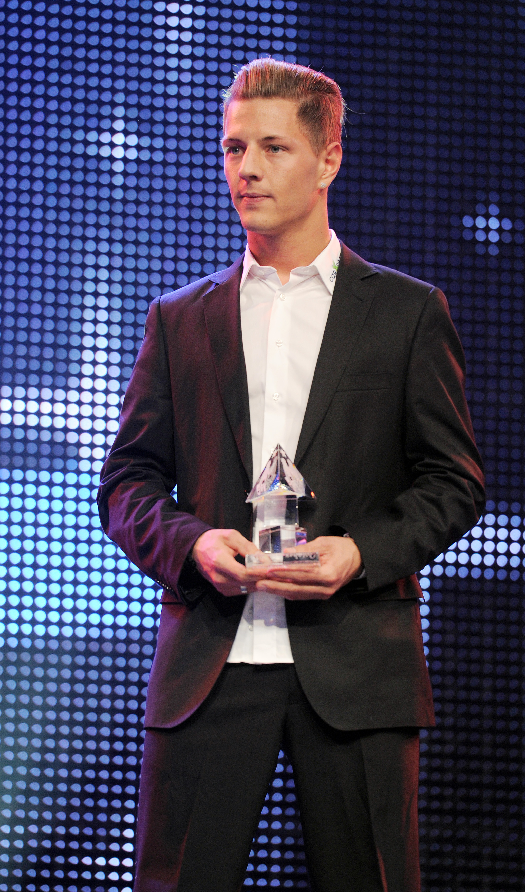 Davos, 03.10.2014. Sport, 12. Internationale Sportnacht Davos 2014. Motorradfahrer Dominique Aegerter.. Copyright by: foto-net / Kurt Schorrer